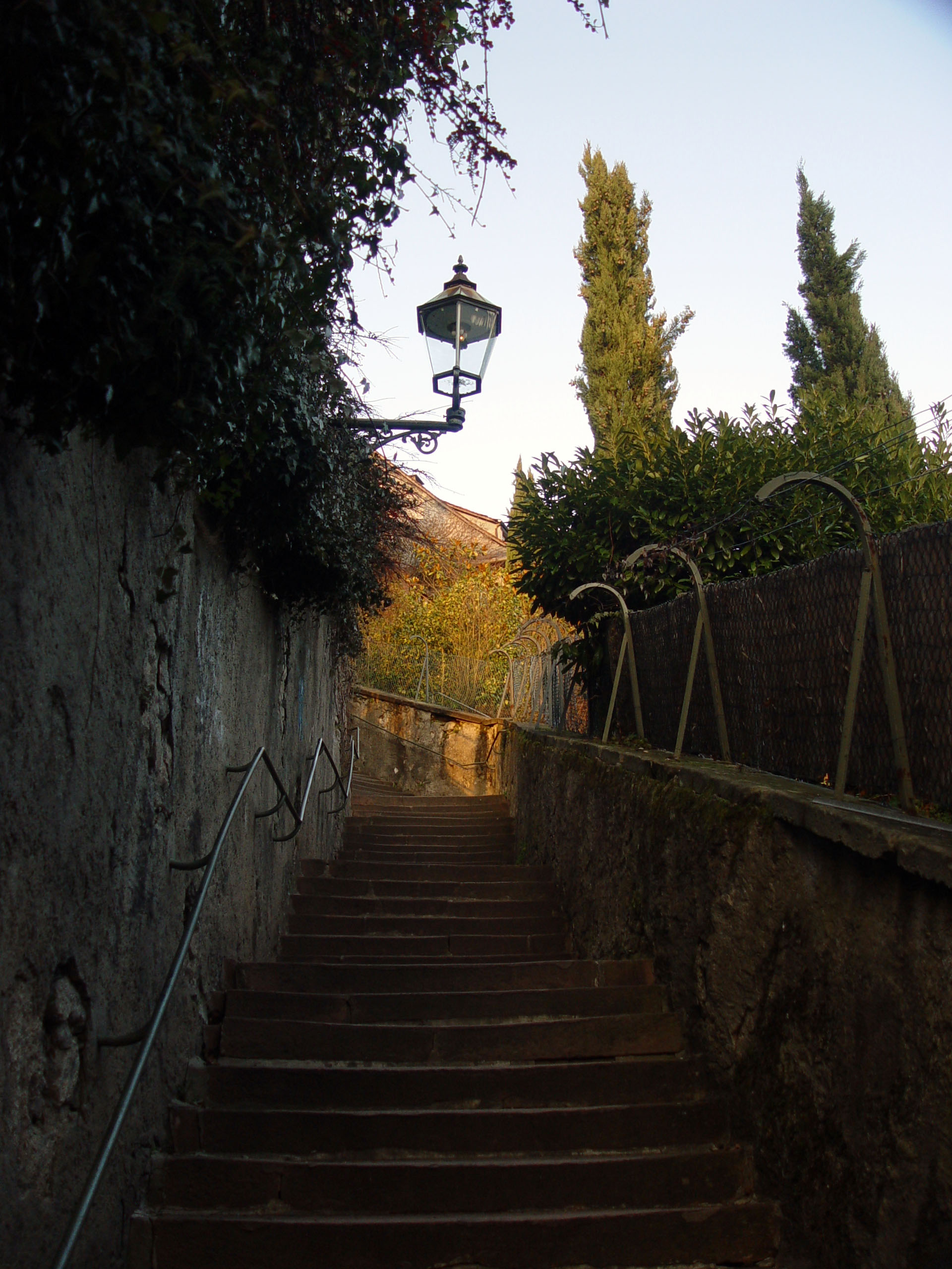 Motiv: Schlossgasse in Baden-Baden. Fotografiert von Martin Dürrschnabel Kamera Sony DSC-F717